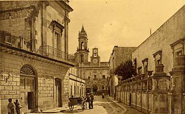 Tricase